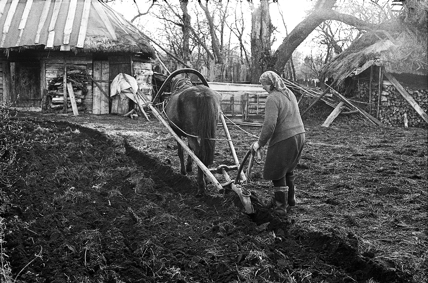 Kündmine Saaremaal. Kasutusel on konksader.